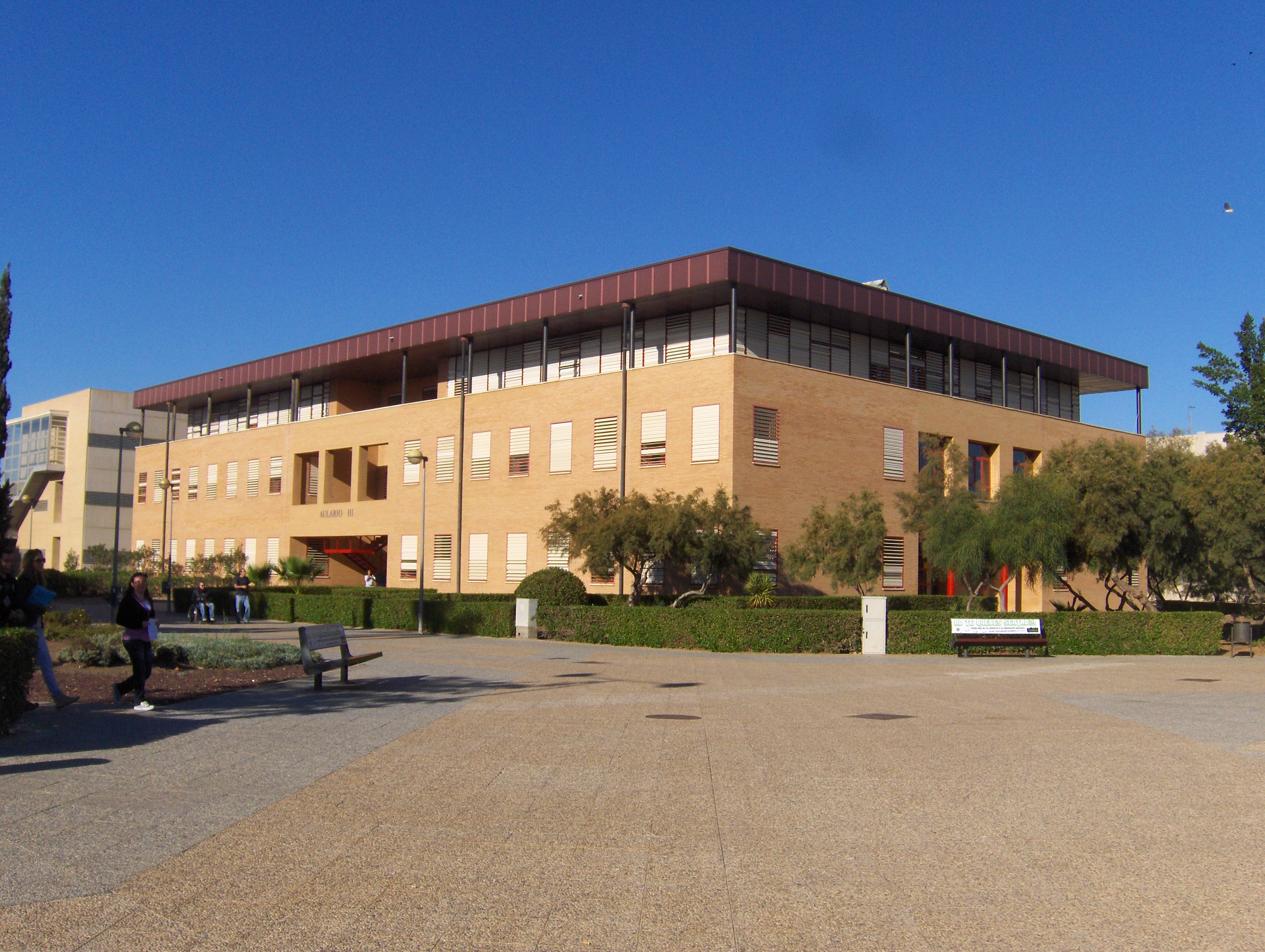 Aulario III de la UAL